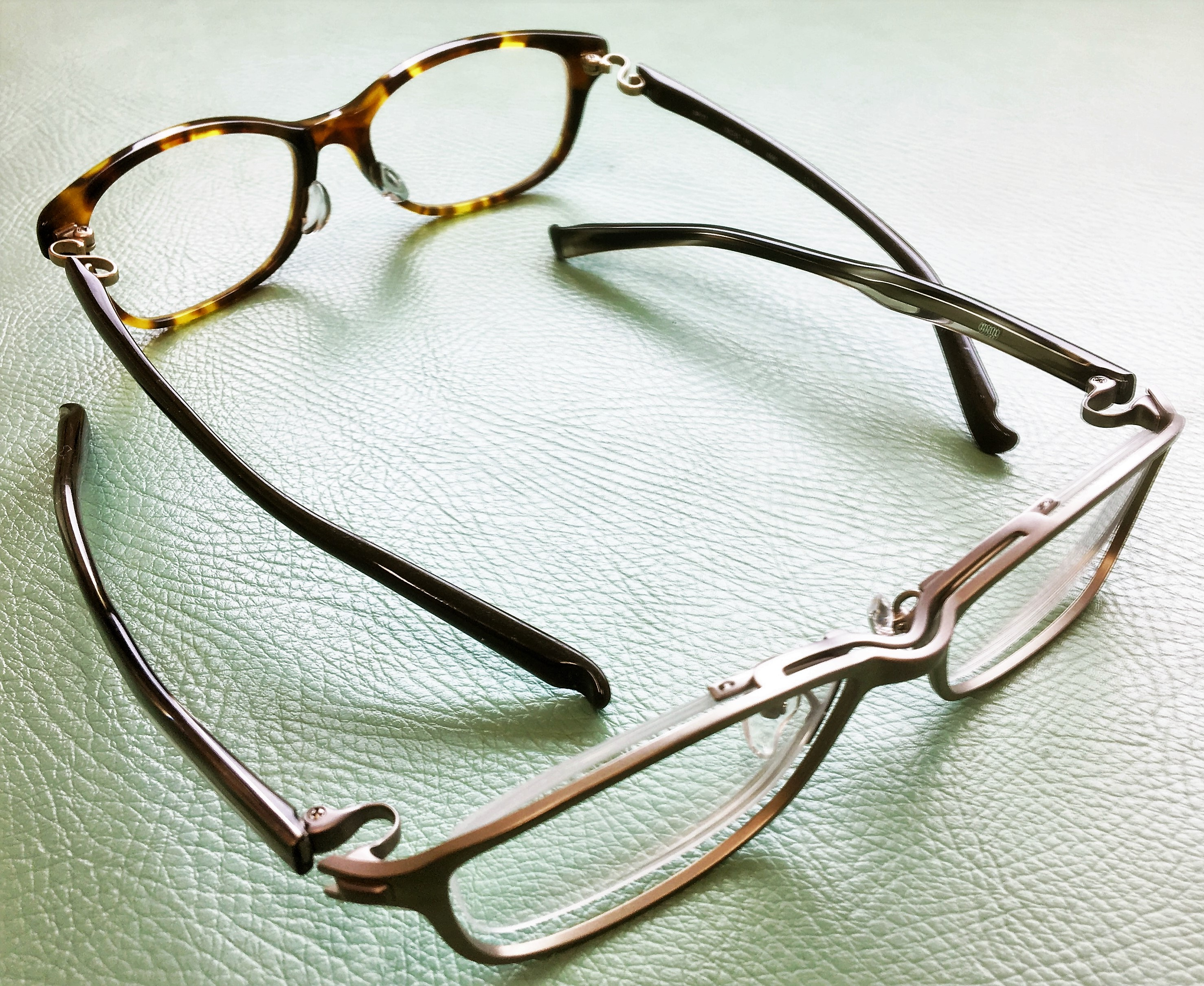 999.9のチタンフレーム（手前）とセルフレーム（奥）。セルフレームは遠近両用レンズを使用